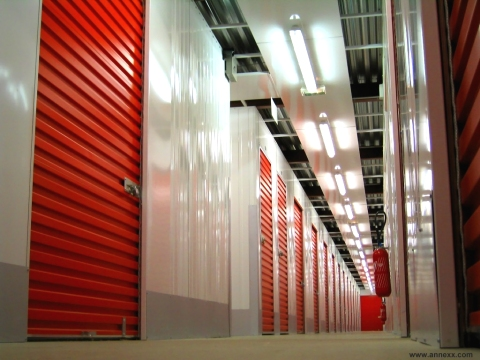 Intérieur d'un site de self-stockage Lieu : Annexx Toulouse Auteur : Spart, 2004 Licence : Domaine public